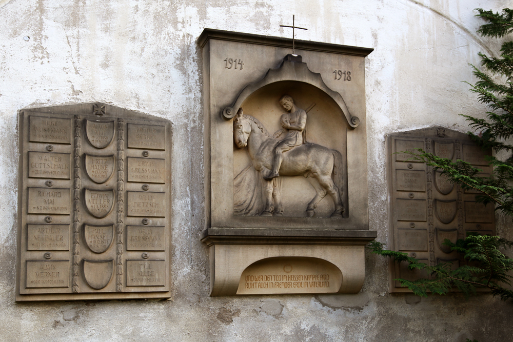 Dorfkirche Wallroda: Gedenktafeln für die Opfer des Ersten Weltkriegs